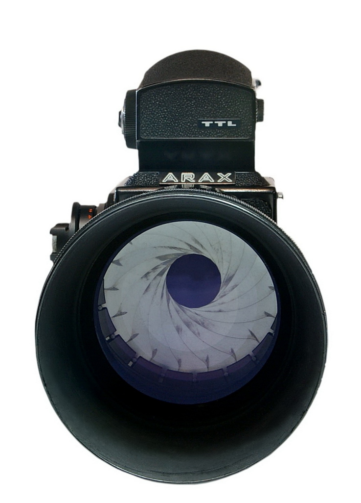 Arax Mittelformatkamera mit Objektiv 300mm/1:4, Irisblende mit 19 Blendenlamellen, mit Gegenlichtblende, freigestellt von Benutzter C-M.